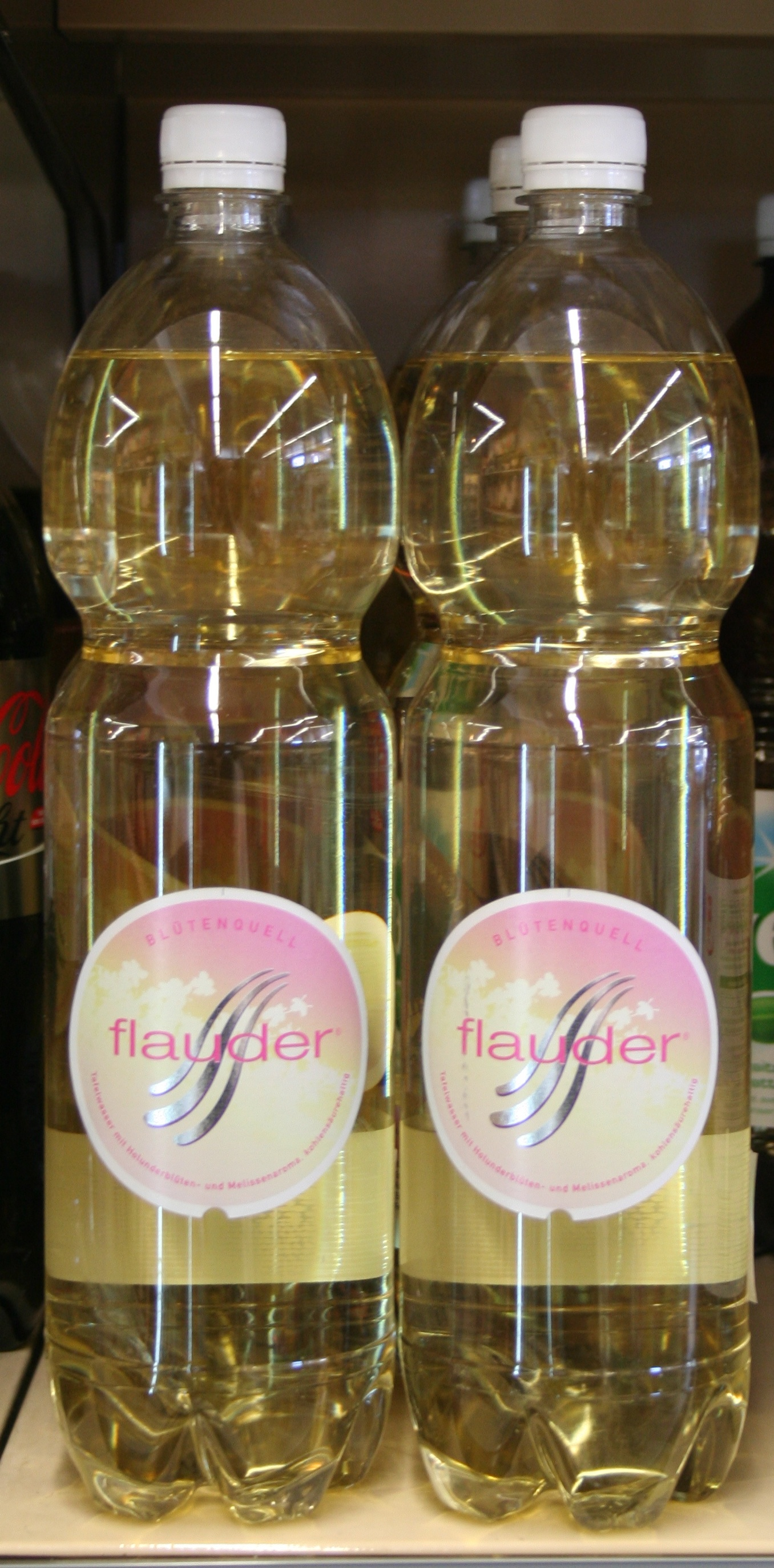 Flauder